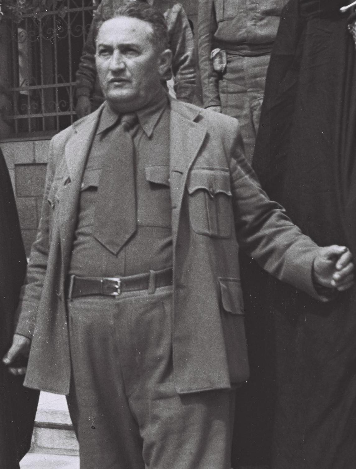 עמינדב אלטשולר